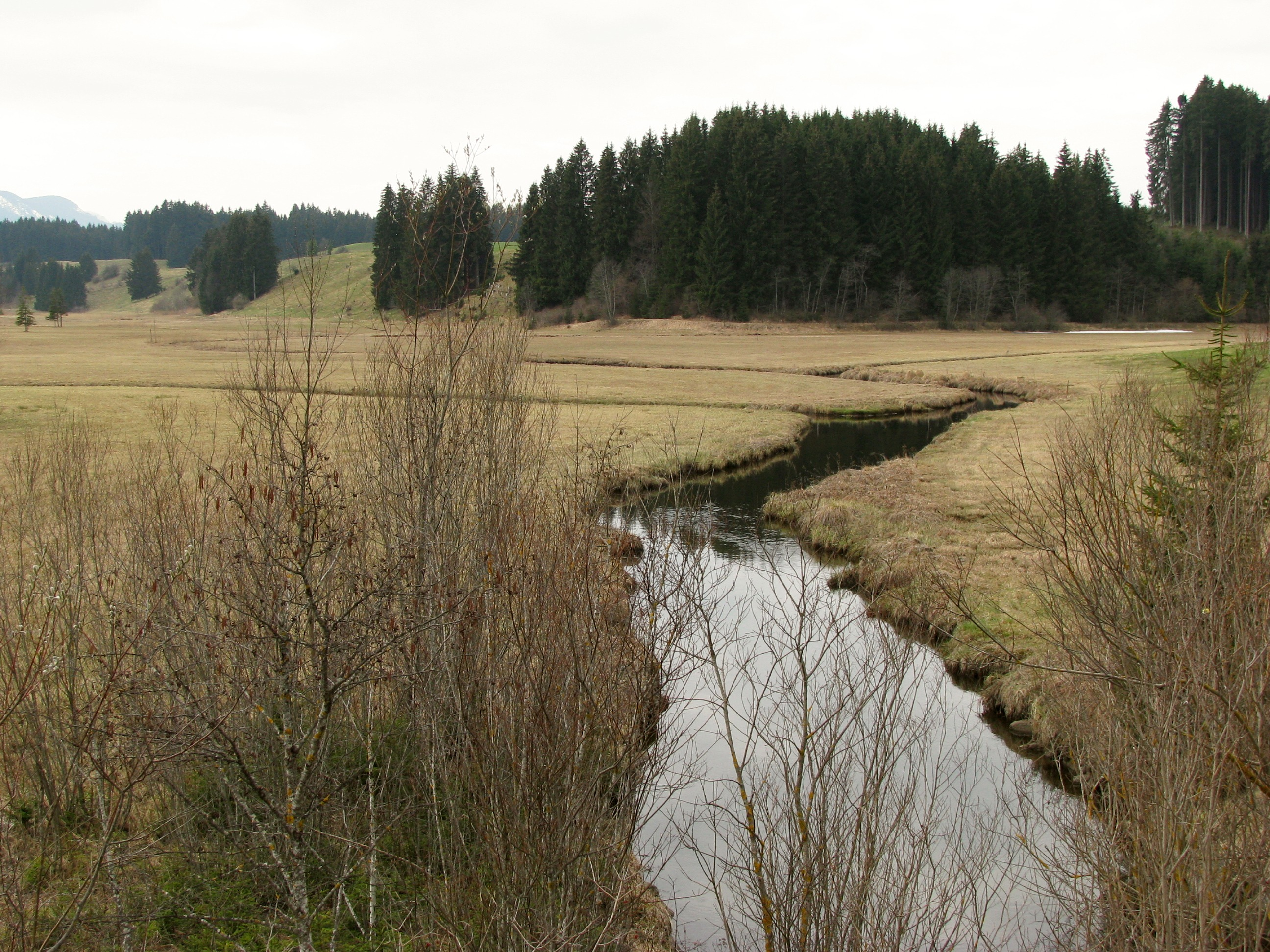 Illach oberhalb der Brücke der St 2059 bei Wildsteig